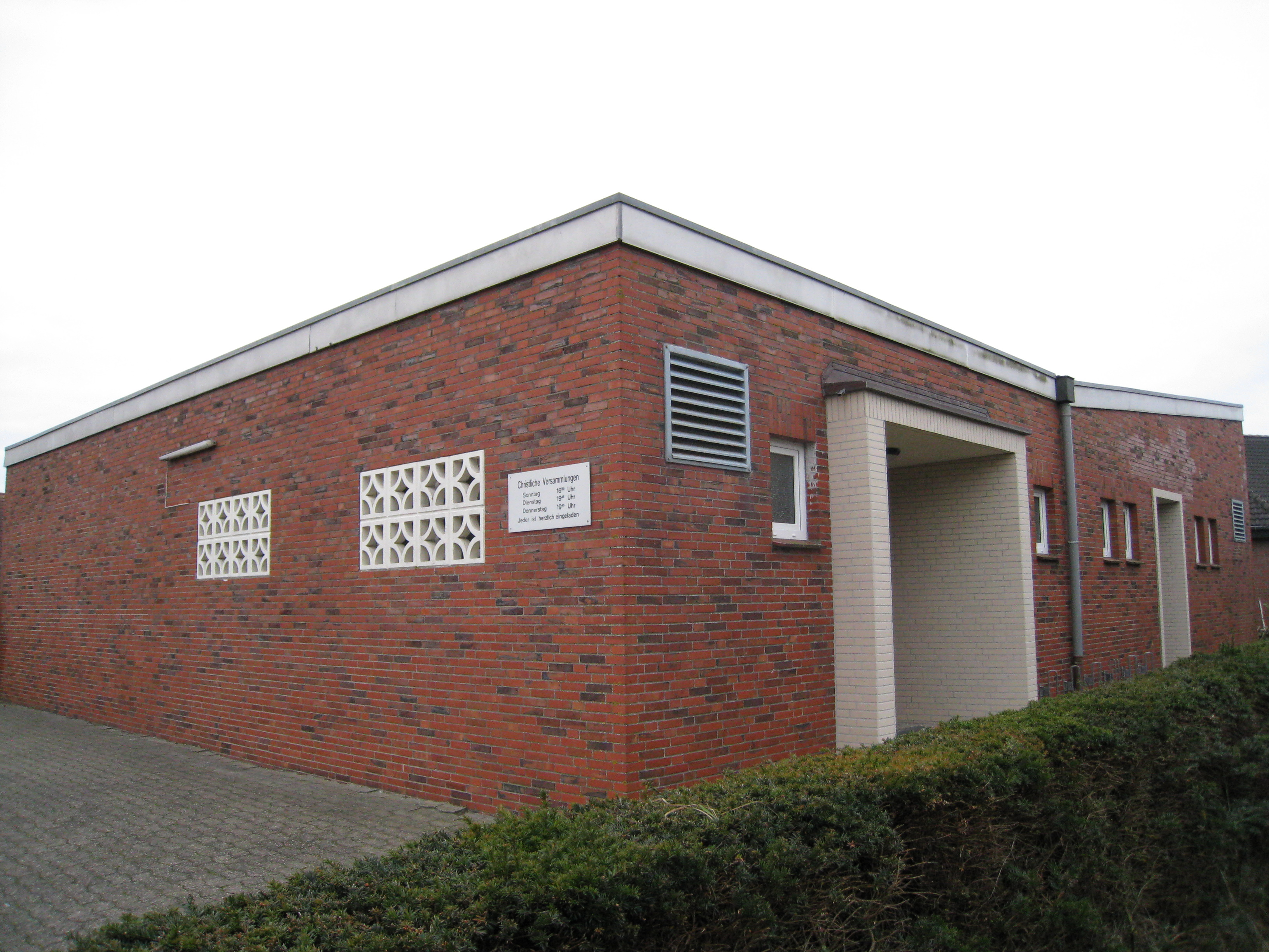 Versammlungs- und Gebetssaal